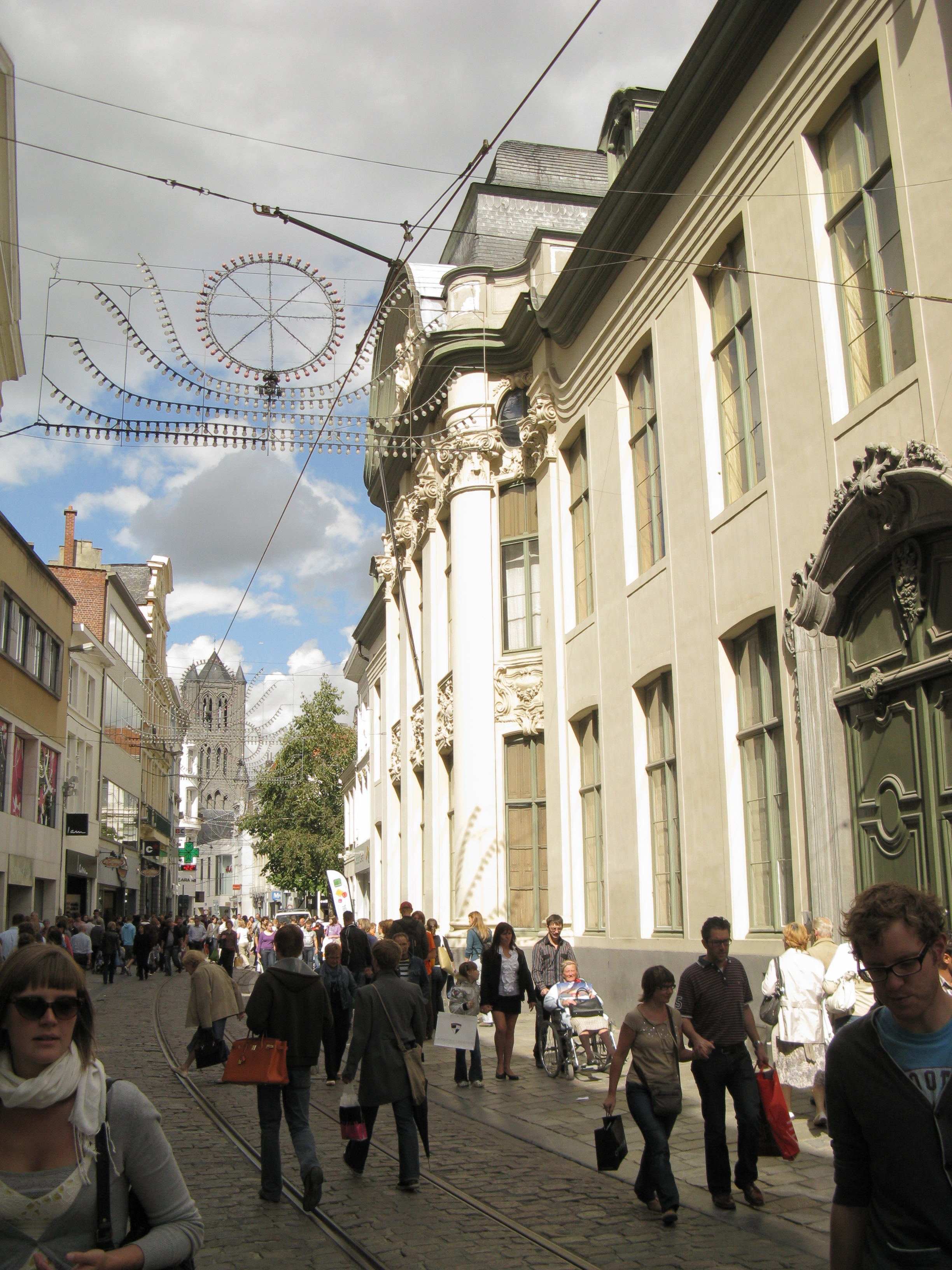 De belangrijkste winkelstraat in Gent, de Veldstraat, met op de voorgrond het Hotel d'Hane Steenhuyse en op de achtergrond de toren van de Sint-Niklaaskerk.